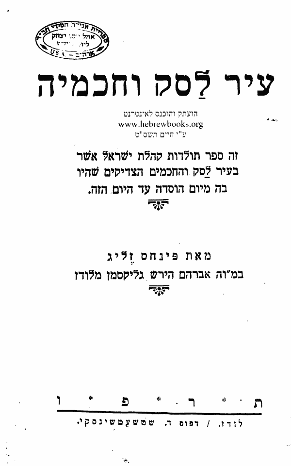 לאסק וחכמיה